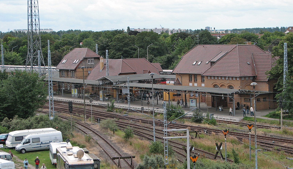 Beschreibung: Bahnhof von Warnemünde Fotograf: Darkone, 13. August 2005